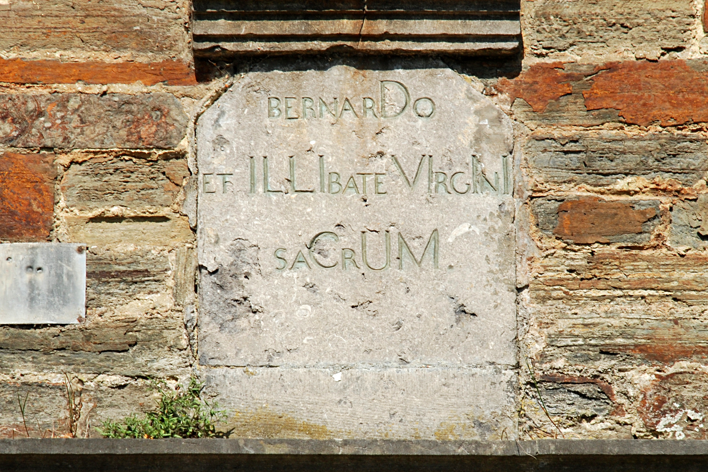 Belgique - Brabant wallon - Villers-la-Ville - Chapelle Saint-Bernard